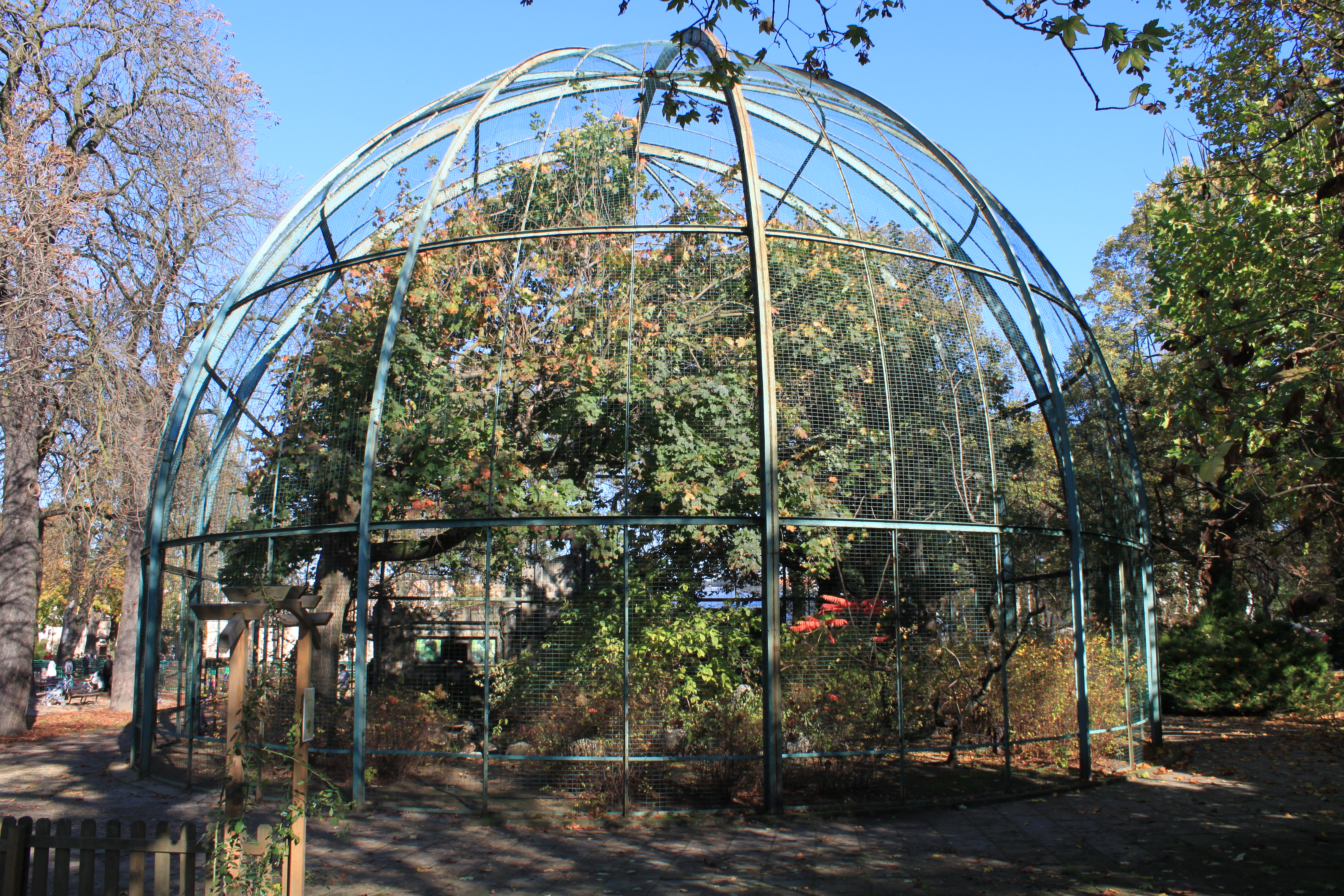 Woliera ptaków brodzących w Starym Zoo